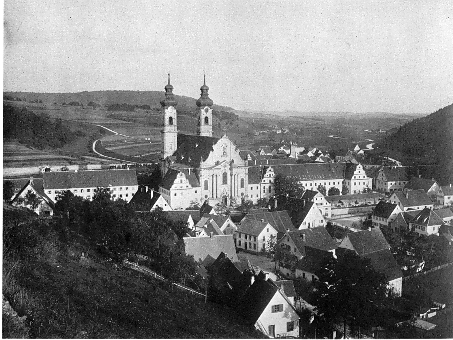 Zwiefalten, Ort und Kloster, 1890, Sammlung Schwäbischer Baudenkmale und Kunstarbeiten, 14, Die Klosterkirchen zu Zwiefalten und Obermarchtal, 164*222mm